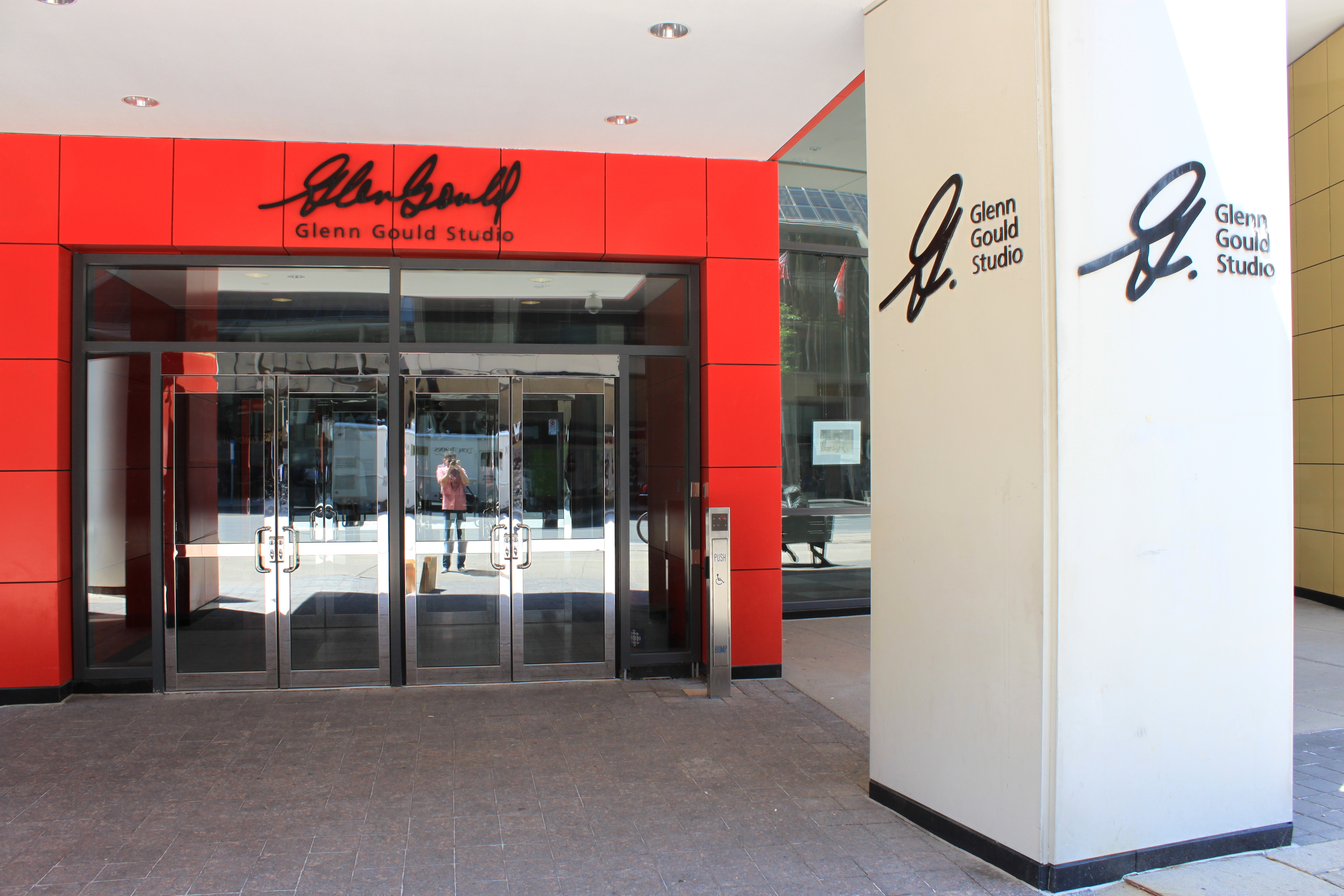 Toronto 171